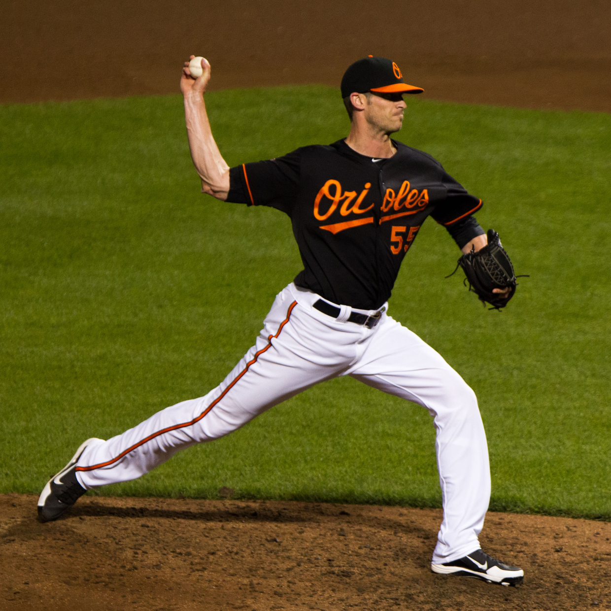 Stuart Pomeranz